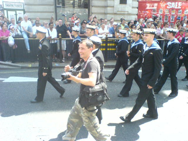 Europride 2006 in London. Navy men